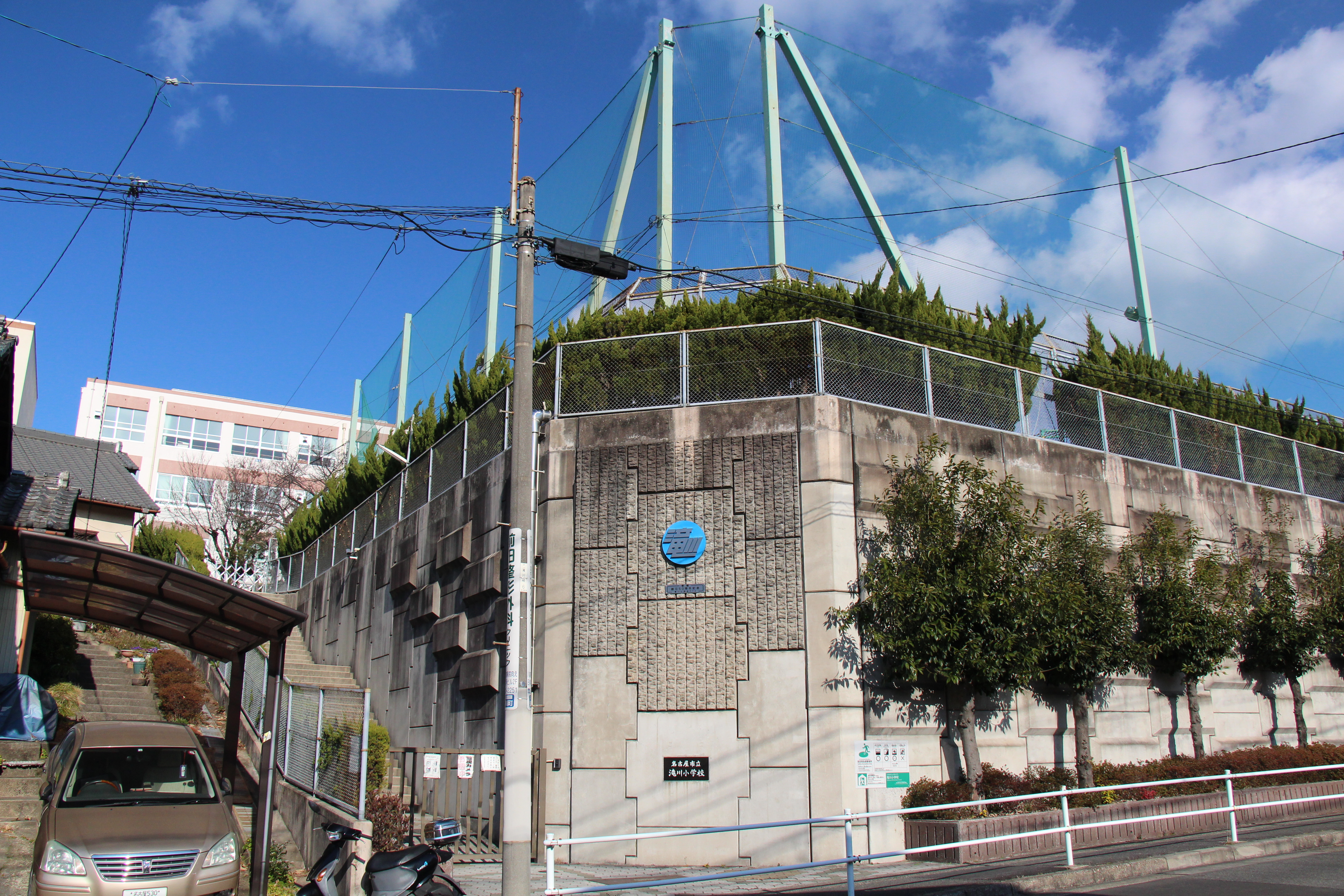 名古屋市立滝川小学校の西側にある入口側から撮影した写真。